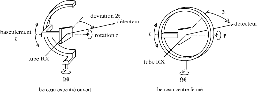 Berceau d'Euler utilisé dans un diffractomètre à rayons X.